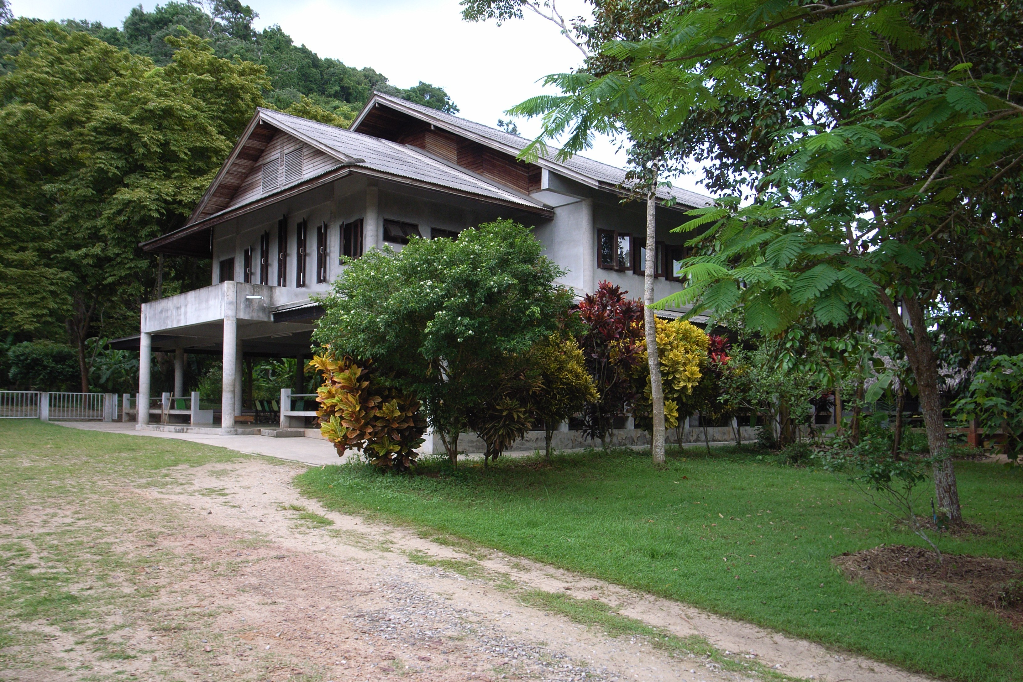 Building at Suan Mokkh International Dharma Hermitage